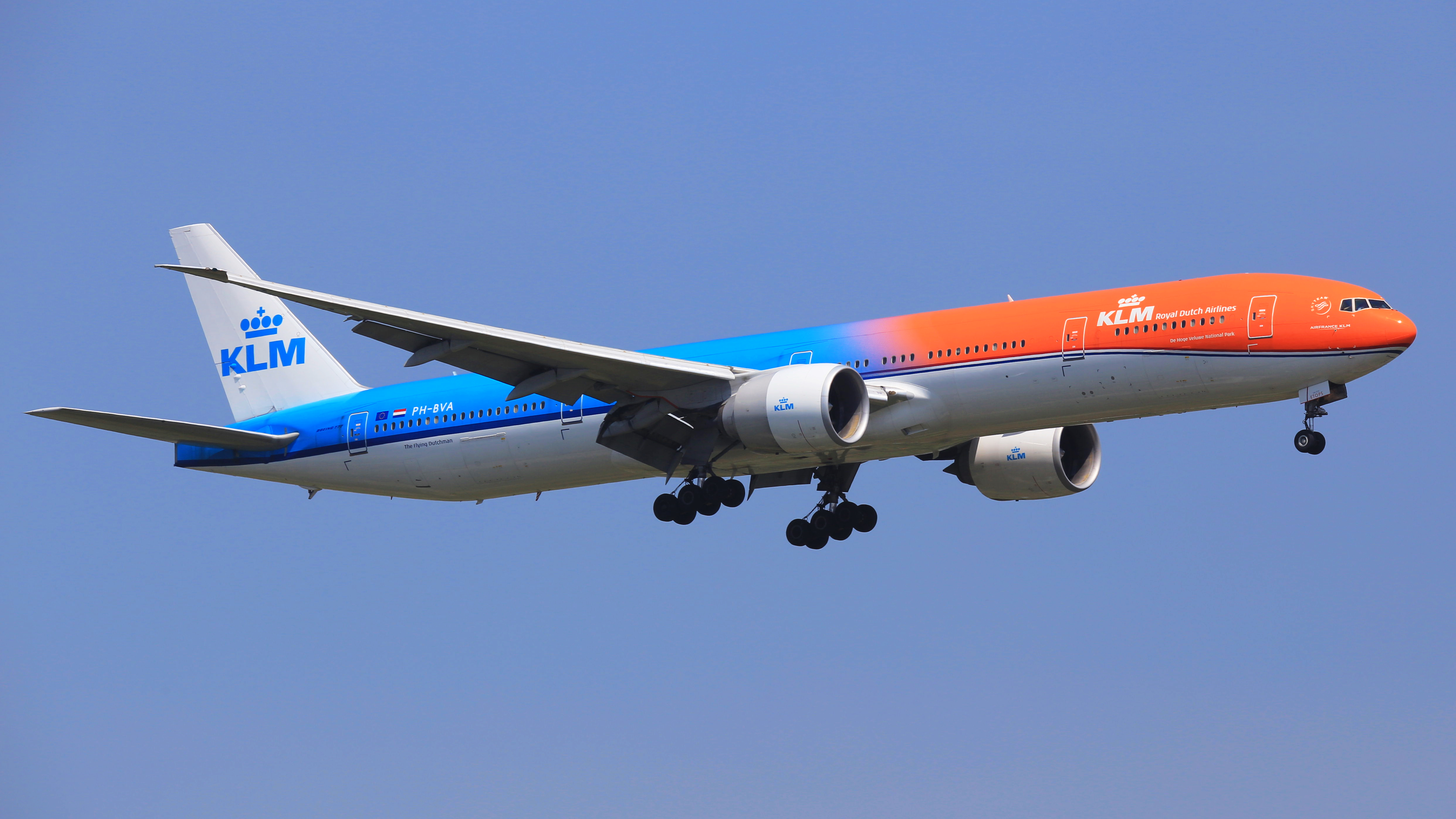 荷蘭皇家航空PH-BVA彩繪機